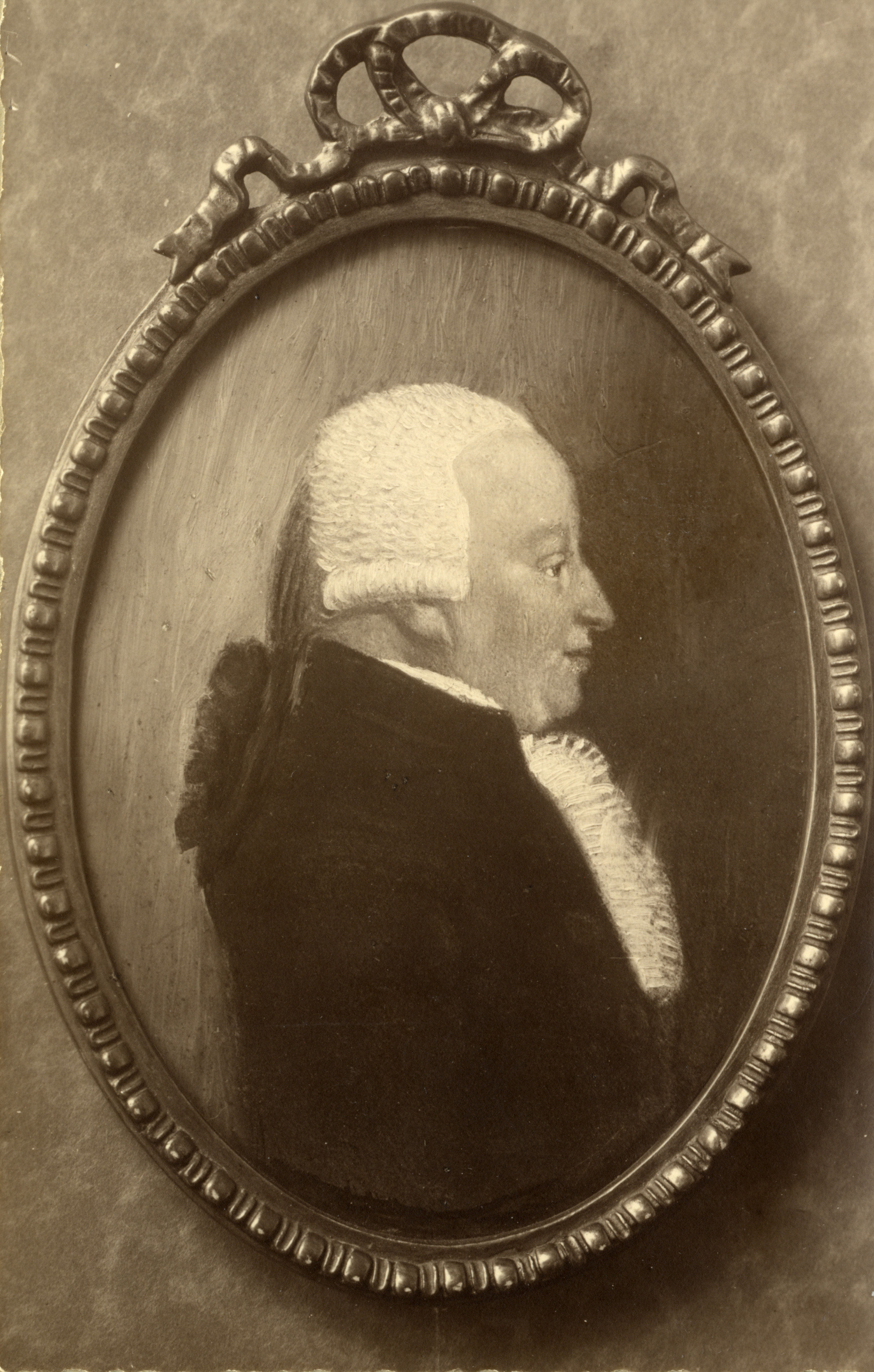 Portret van Jacob Frederik Gobius, geboren 1749, notaris, burgemeester van Utrecht (1818-1821), echtgenoot van A.M. Gobius - du Sart, overleden 1821. Borstbeeld rechts, in profiel, in ovale lijst.Fotoreproductie van een anoniem schilderij uit ca. 1790. Het schilderij en de pendant van A.M. Gobius - du Sart (nr. 104777) bevond zich begin 20ste eeuw bij de heer G.J.F. Gobius du Sart te Ouddorp.